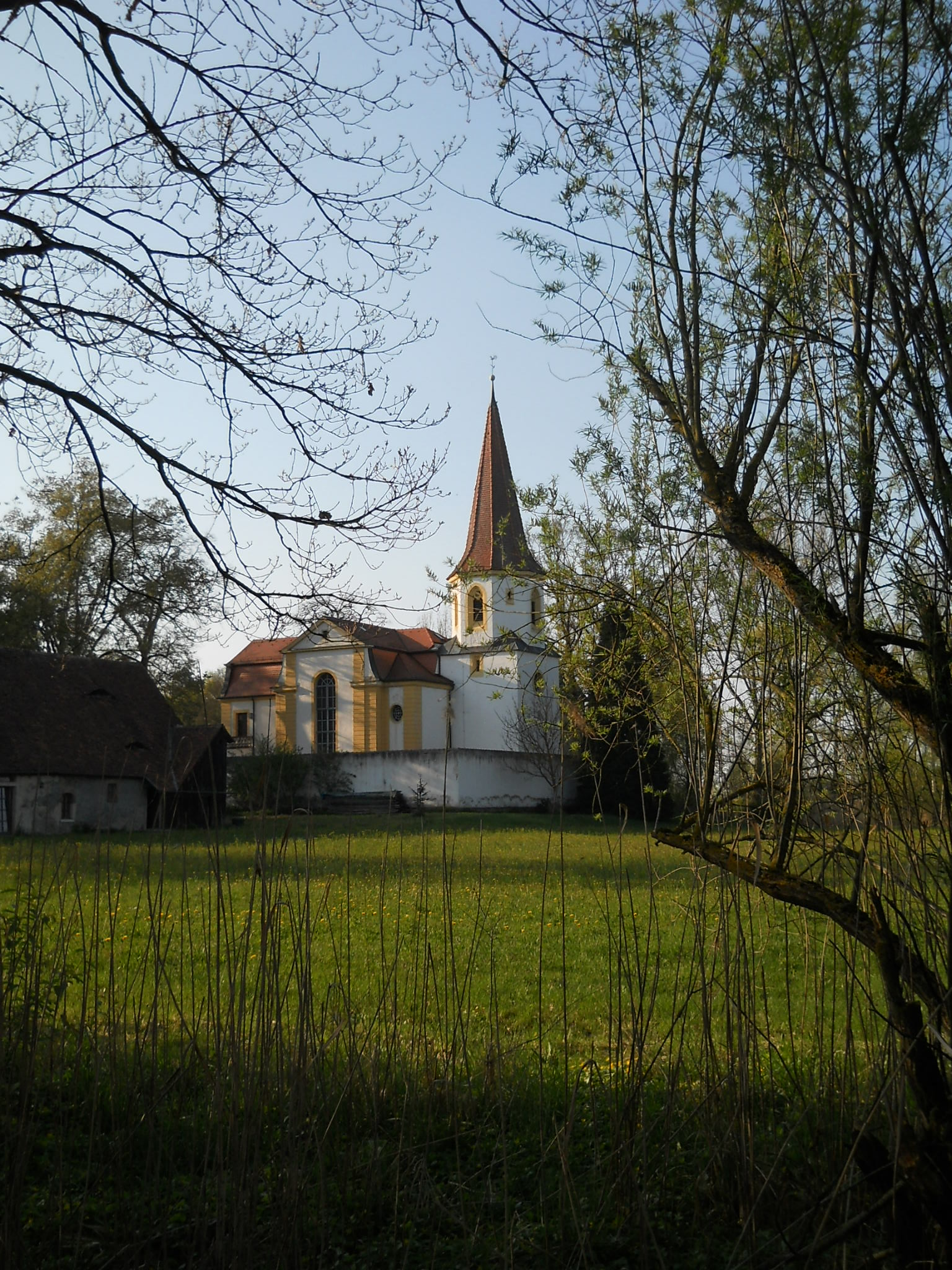 Kirche St. Martin Ägidius in Wald, Ortsteil von Gunzenhausen im Landkreis Weißenburg-Gunzenhausen (Bayern)